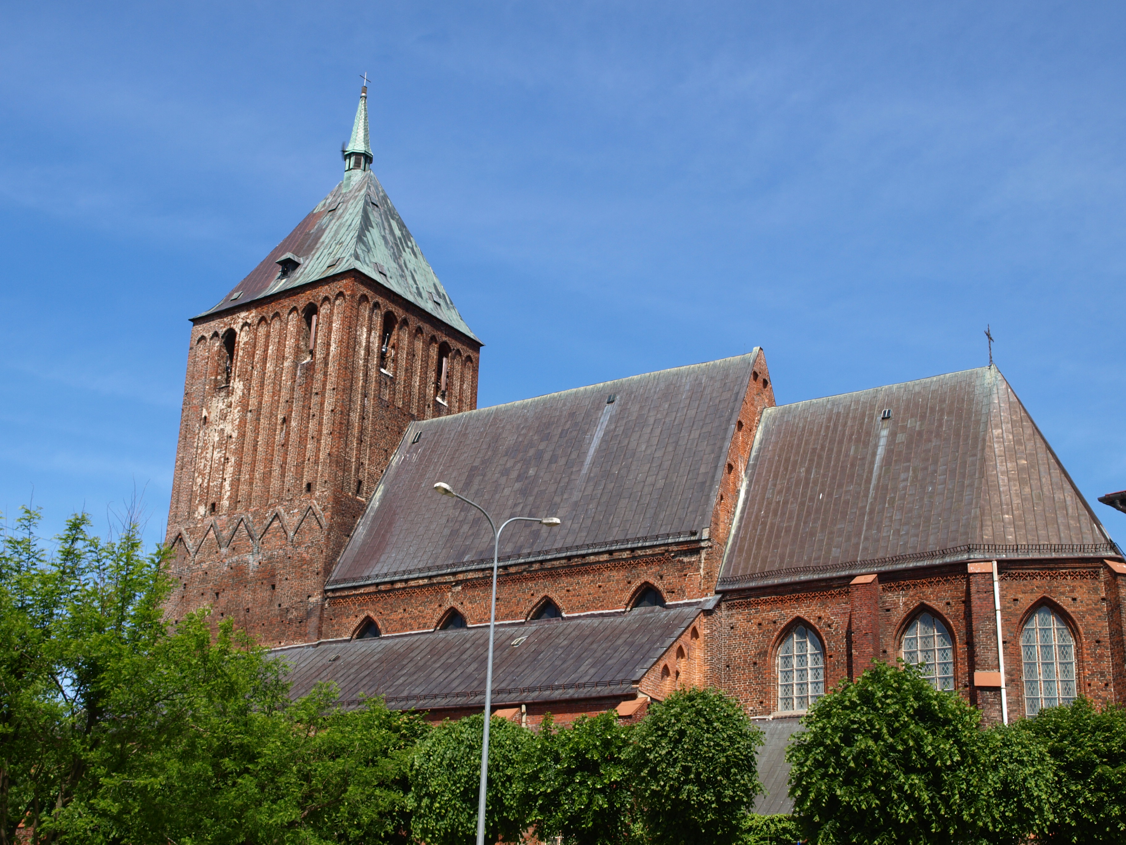 Sławno, ul. Kościuszki (pl. Kardynała Wyszyńskiego) - rzymskokatolicki kościół parafialny pw. Wniebowzięcia NMP z lat 1326-1368, kon. XIX, 1947-1957.